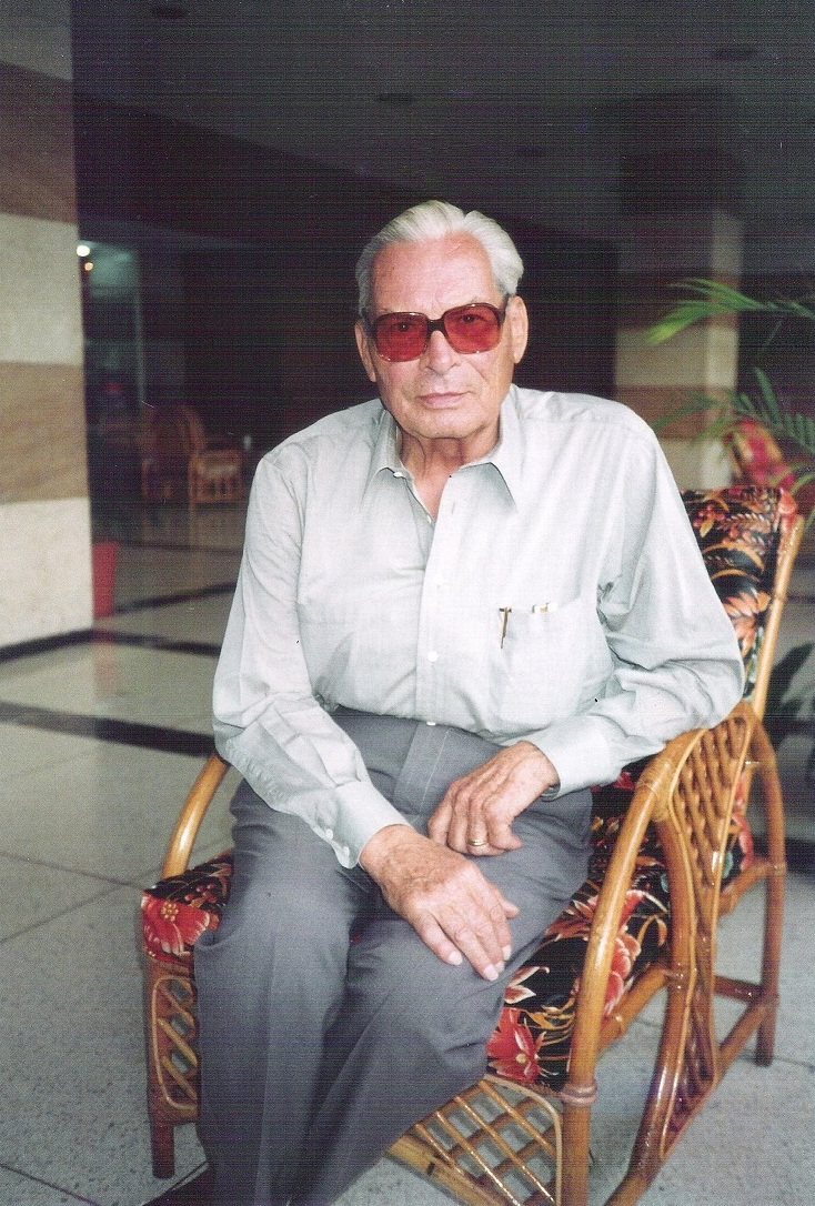 Antonio W. Goldbrunner en octubre de 1998, a los 84 años de edad, en una fotografía tomada por Sergio Foghin para ilustrar un artículo sobre su labor realizada en Venezuela en el campo de la Meteorología. Imagen cedida por su autor para ser incluida en el artículo de la Wikipedia sobre A. W. Goldbrunner.